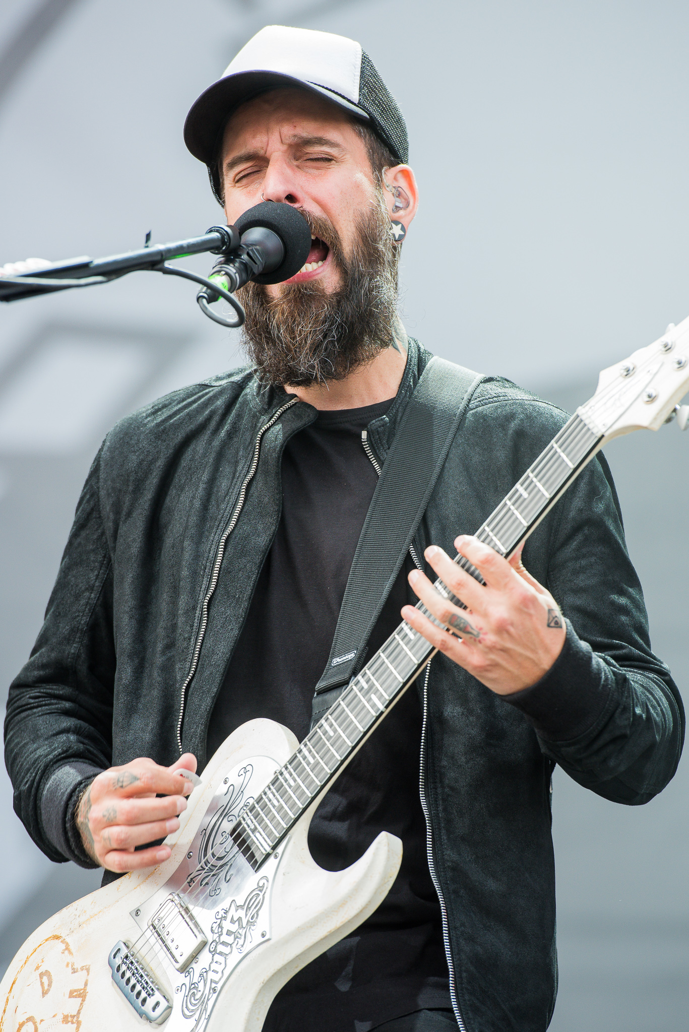 ARGO-Konzerte,Festival,Konzert,Livekonzert,Livemusik,Musik,RiP,Rock im Park 2016,Seat Zeppelin Stage,Wirtz